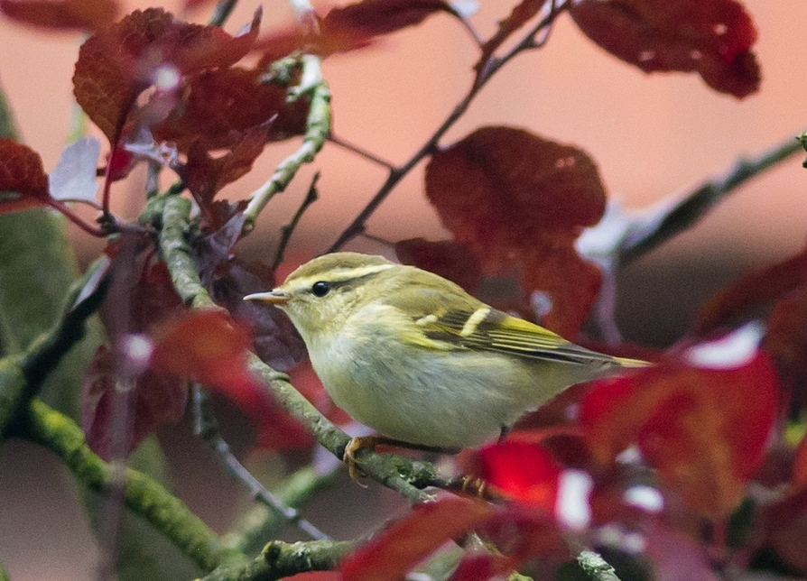 Phylloscopus inornatus, Velp, Guelders, Netherlands